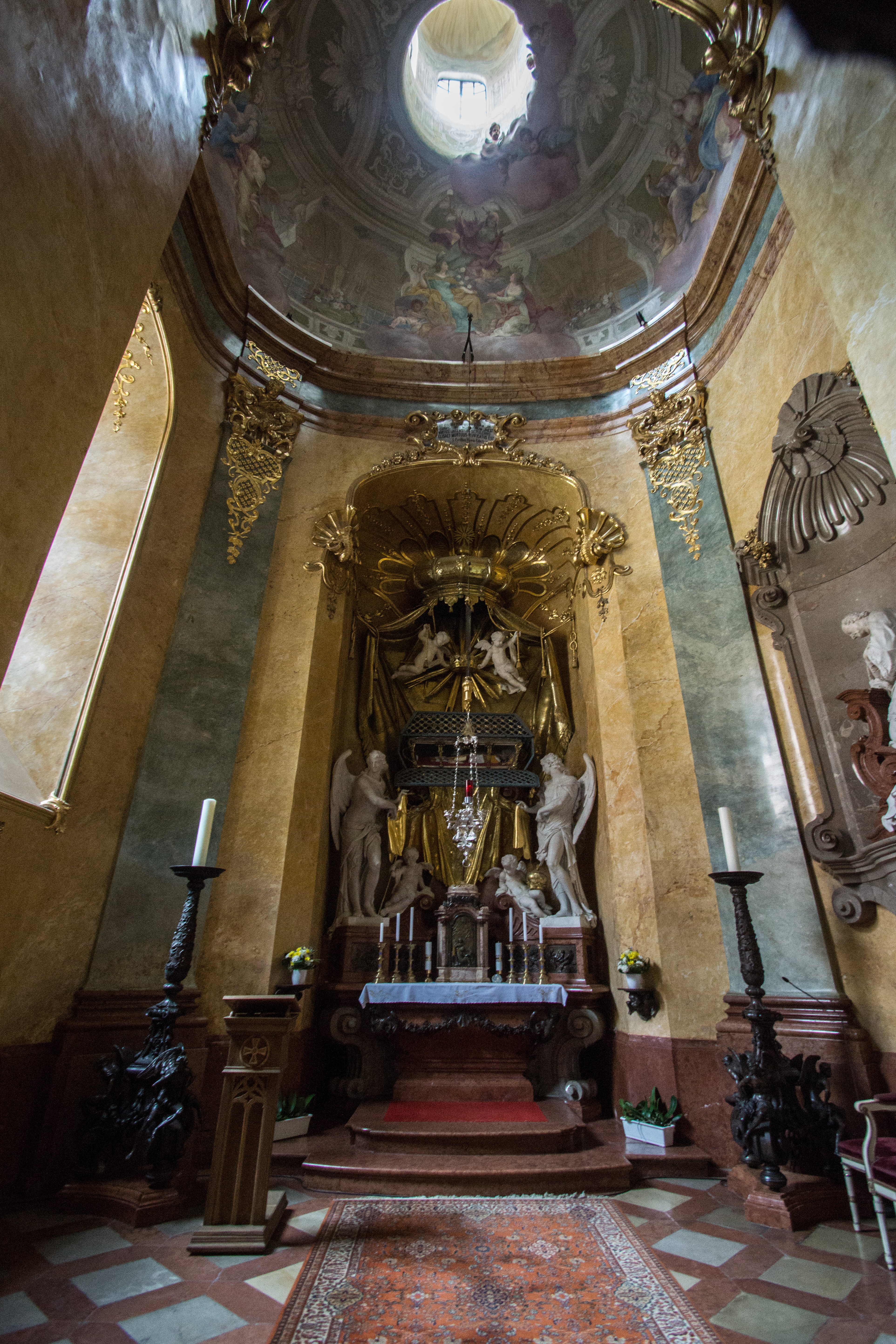 Catedral de San Martin. Capilla.